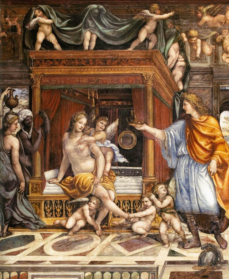 detail